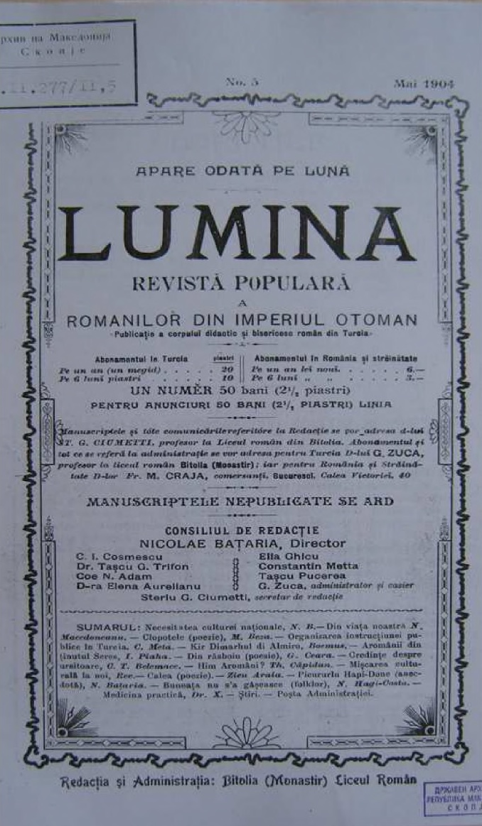 Лумина